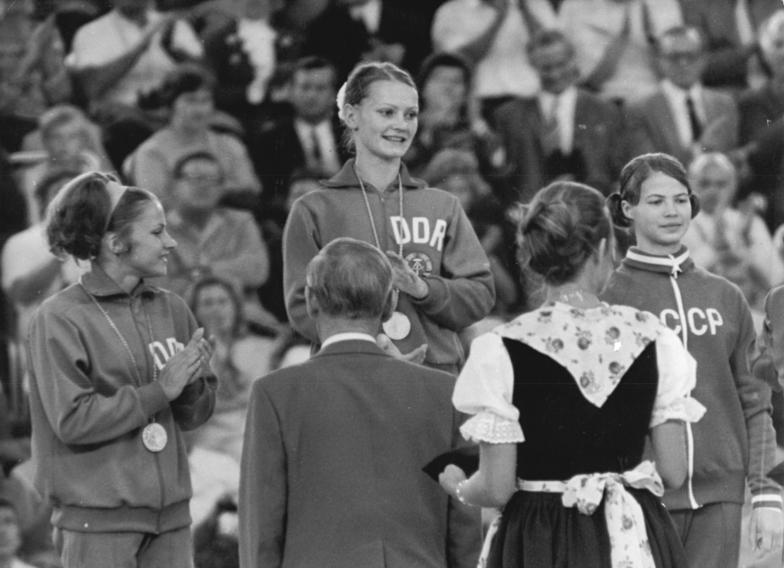 ADN-ZB-Olympiadienst-Kohls-1.9.1972-ma-München: XX. Olympische Sommerspiele. Die Finalwettkämpfe der Frauen im Turnen an den einzelnen Geräten, standen am Abend des 31.8.1972 völlig im Zeichen der großartigen Mädchen aus der UdSSR und der DDR. Die 19jährige Berliner Medizinstudentin Karin Janz (mitte), erkämpfte sich zwei Goldmedaillen. Hier während der Siegerehrung beim Pferdsprung, wo sie 19,525 Punkte erreichte. Links Erika Zuchold (Silbermedaille mit 19,275 Punkten, beide DDR). Rechts die Mehrkampfsiegerin Ludmilla Turistschewa (UdSSR, Bronzemedaille, 19,250).